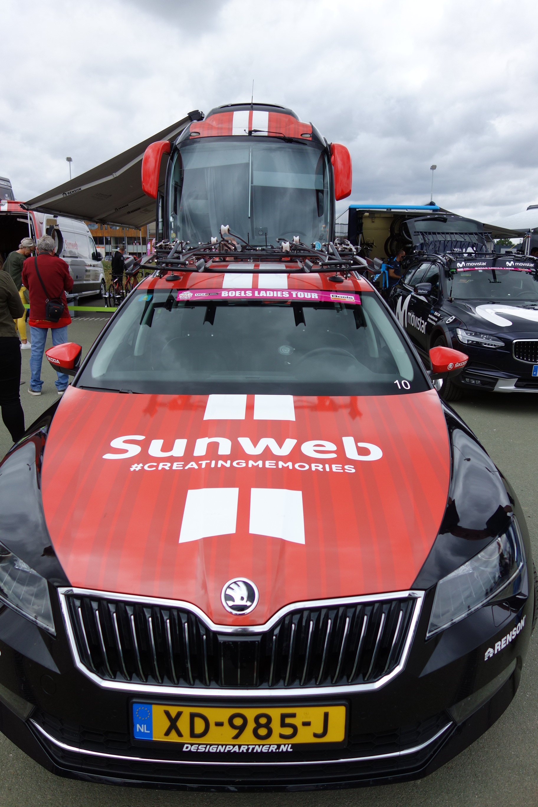 Ploegleidersauto van Sunweb bij de proloog op het Tom Dumoulin Bike Park in Sittard in de Boels Ladies Tour 2019